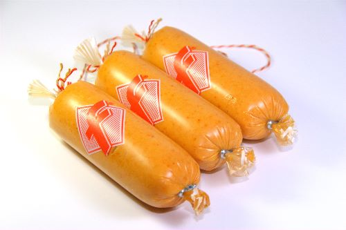 3 Stck. Teewurst, aus handwerklicher Herstellung eines deutschen Fleischerfachgeschäftes (kenntlich durch die f-Marke).